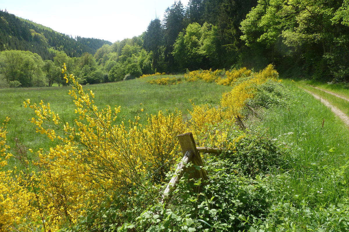 Ginsterblüte im Armuthsbachtal zwischen Pitscheid (Hümmel) und Wennefeldermühle, Landkreis Ahrweiler, Rheinland-Pfalz.